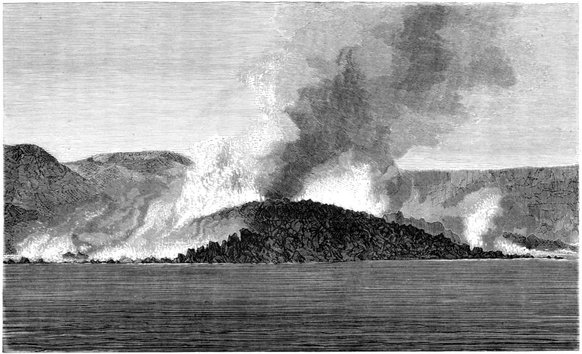 Volcans de Santorin. Illustration de "Histoires des météores", p. 437